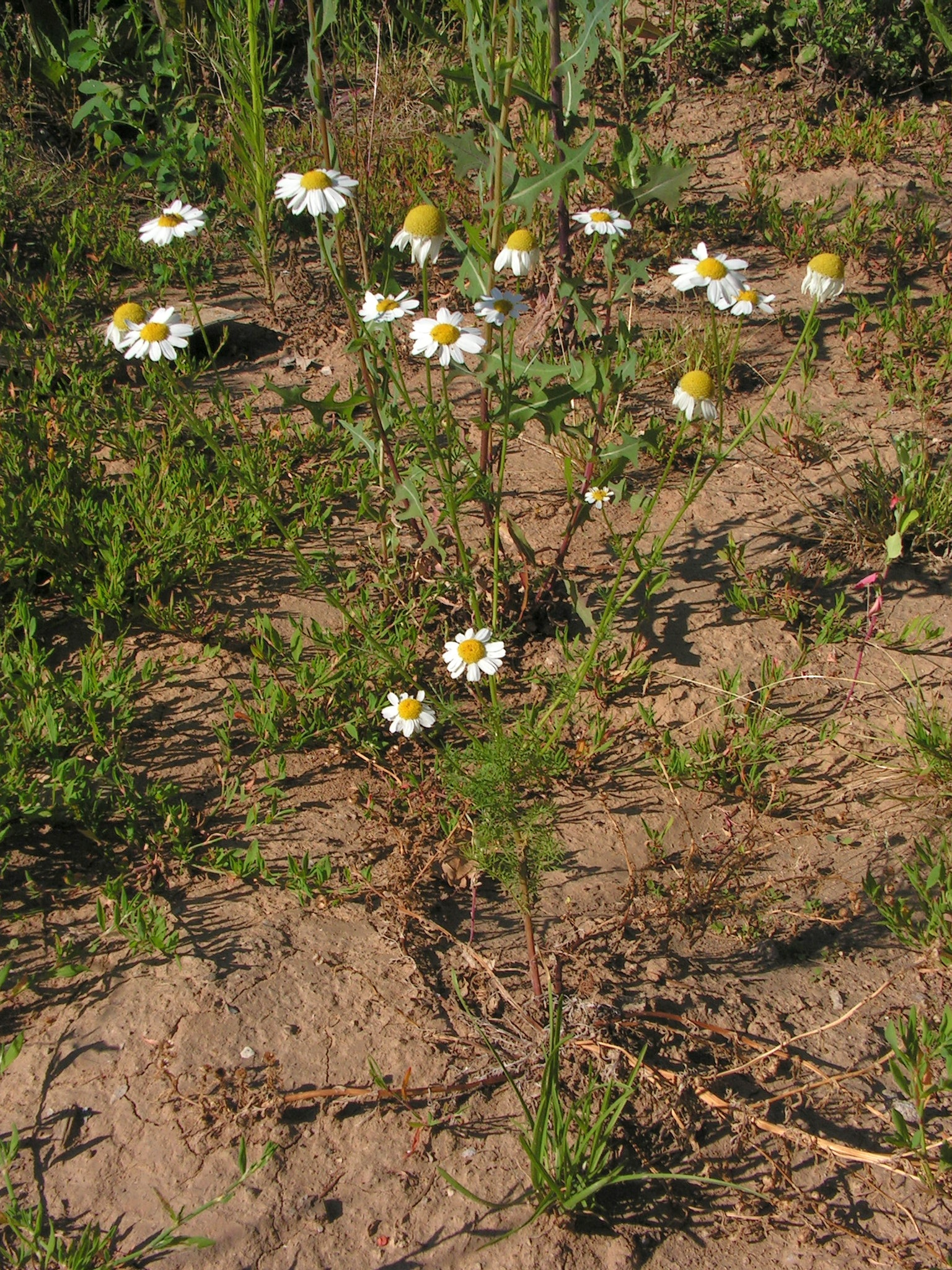 Matricaria chamomilla L. Moscow region, Russia.